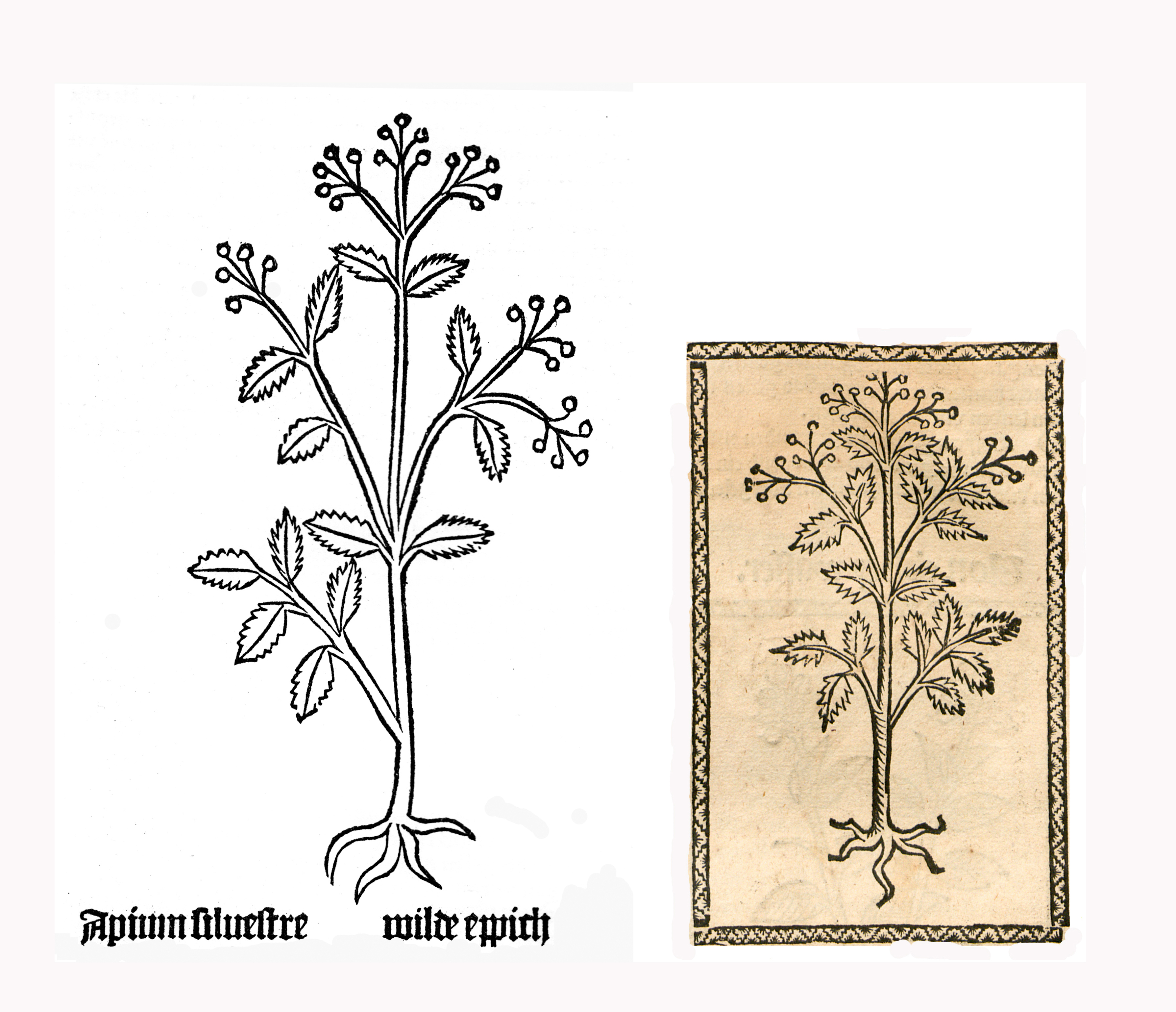 Abbildung von Epff (Apium)